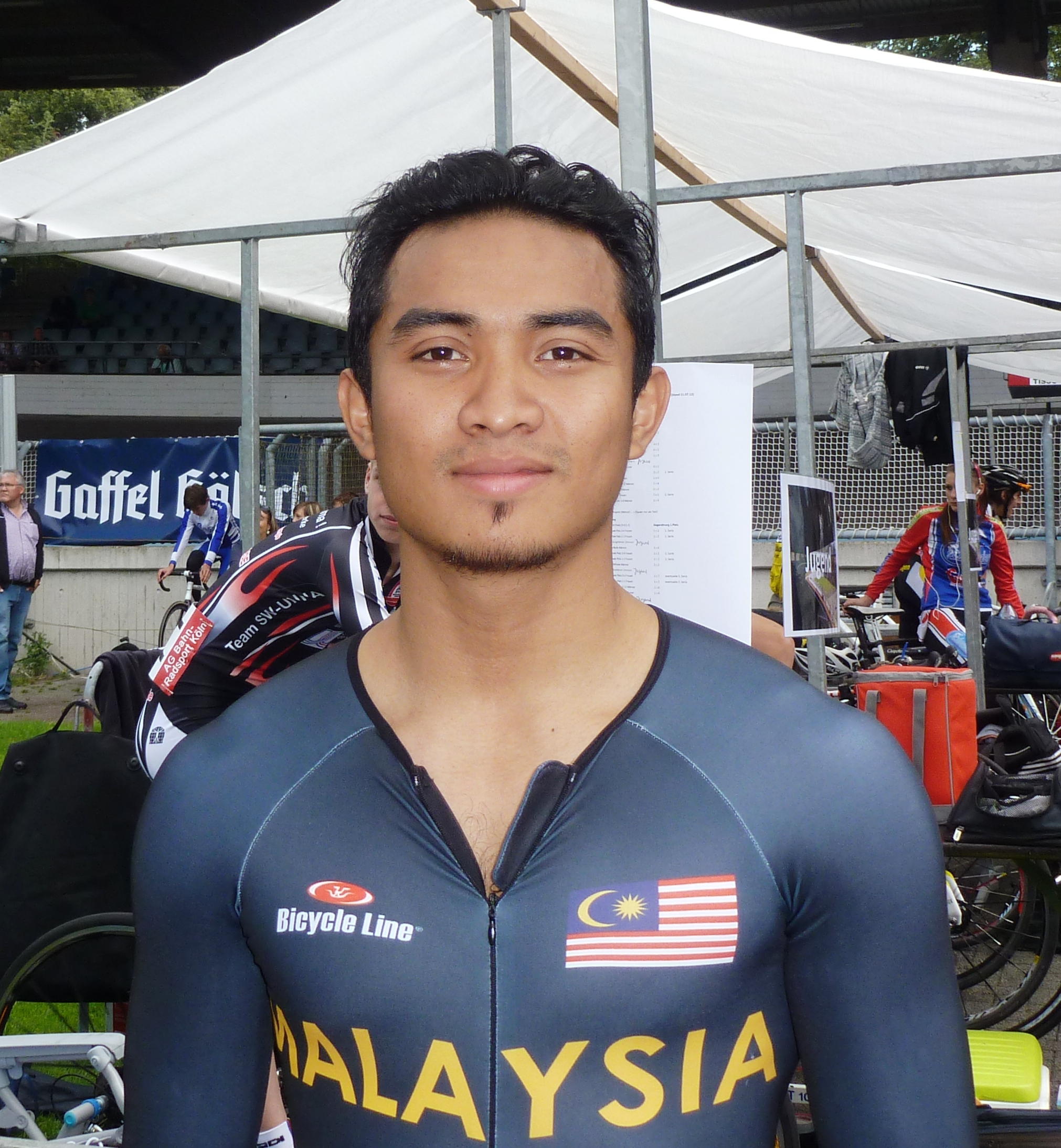 Azizulhasni Awang, malaysischer Radsportler